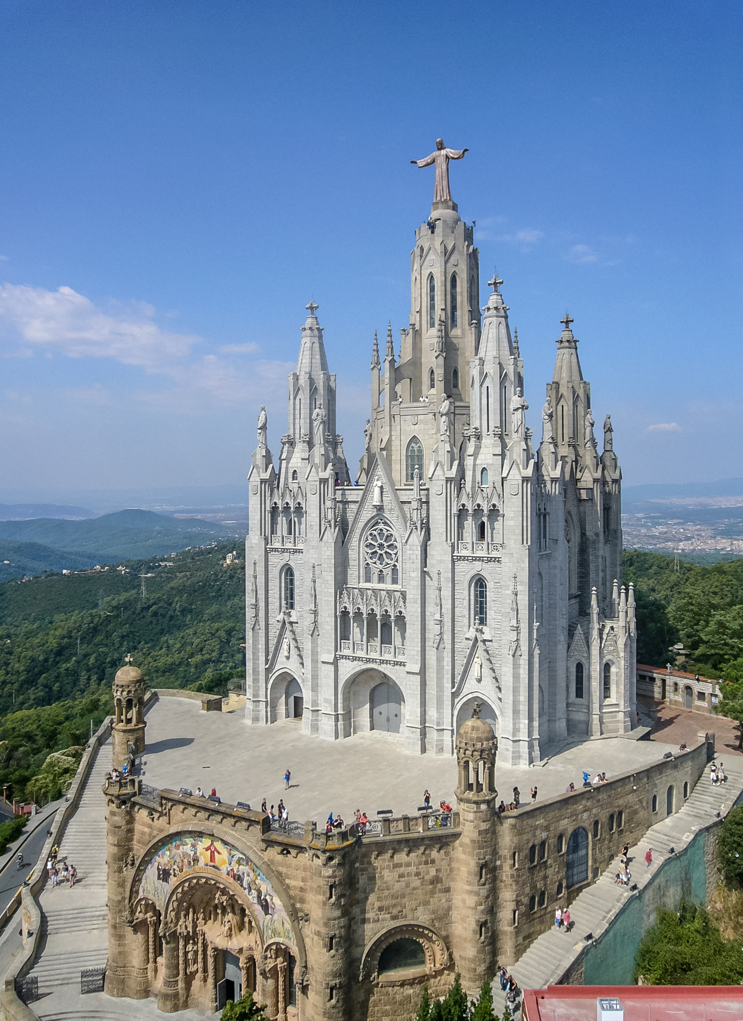 Temple del Sagrat Cor vist des de la Talaia del Tibidabo